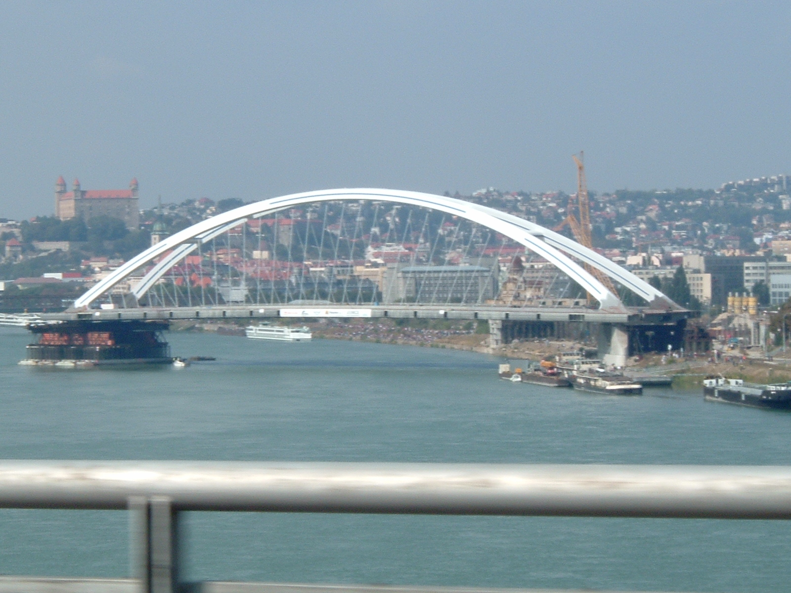 Most Apollo - otáčanie (19. 9. 2004)